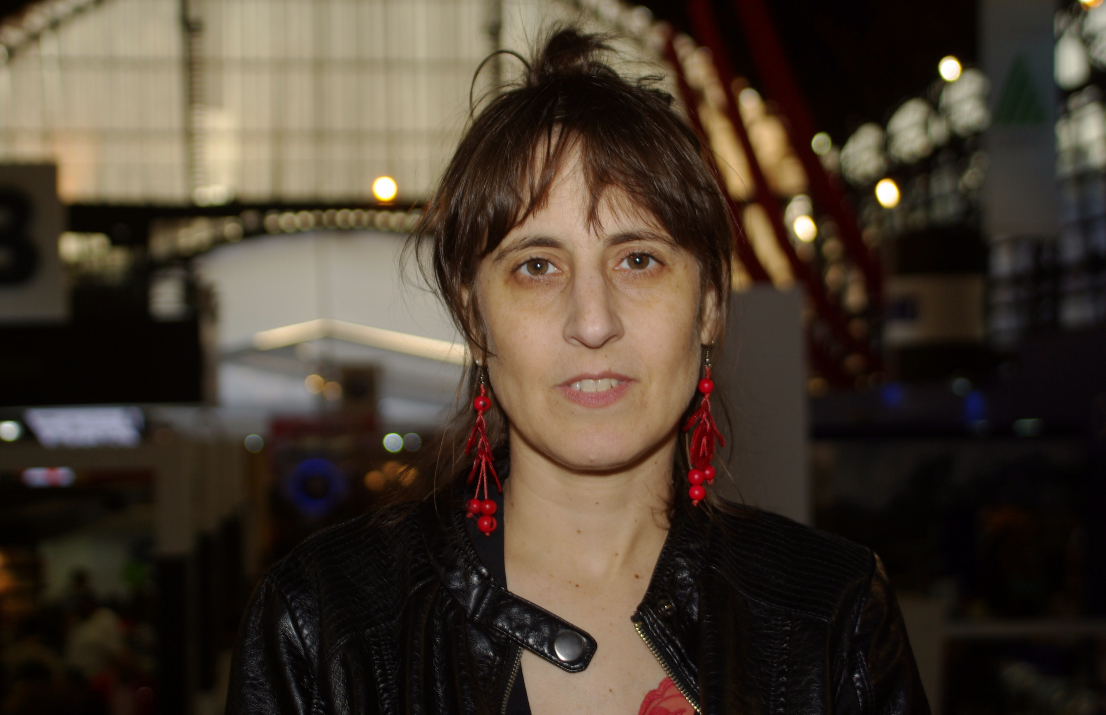 La escritora chilena Alejandra Costamagna en la Feria Internacional del Libro de Santiago 2015